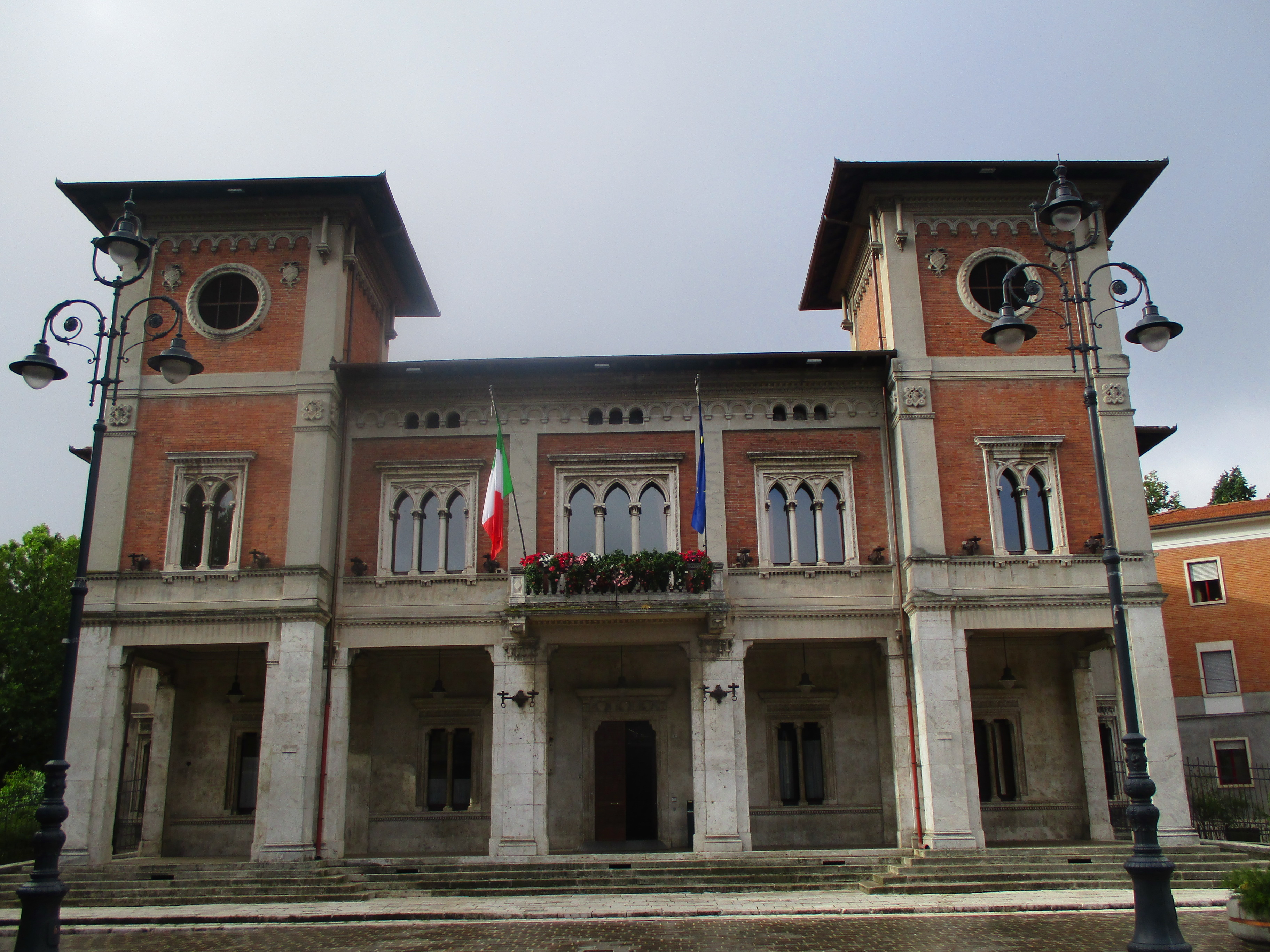 Facciata del palazzo municipale